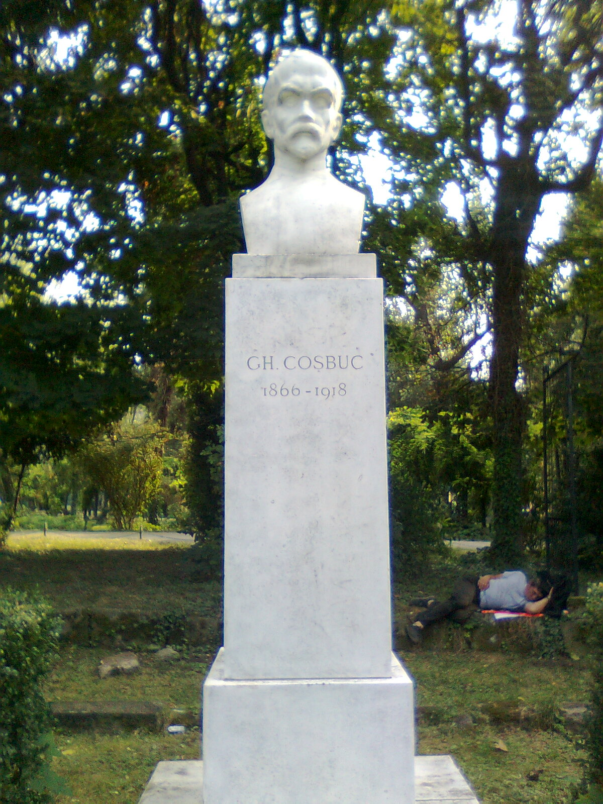 Bustul lui George Cosbuc